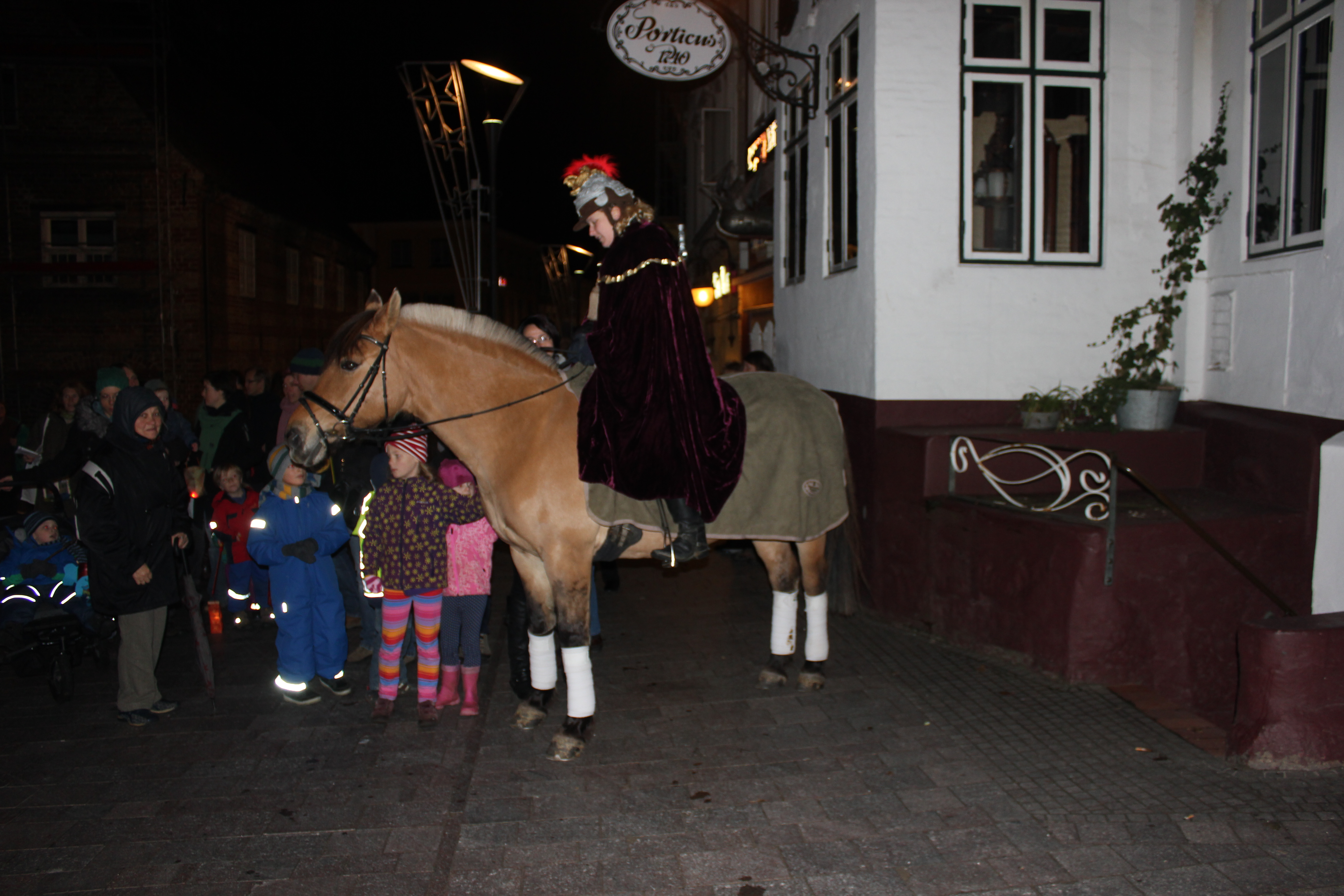 Ökumenischer St. Martinszug in Flensburg 2013, Route kath Kirche, zur DIAKO-Kirche, an Heiliggeistkirche vorbei, zur ev St. Marienkirche, Bild 022